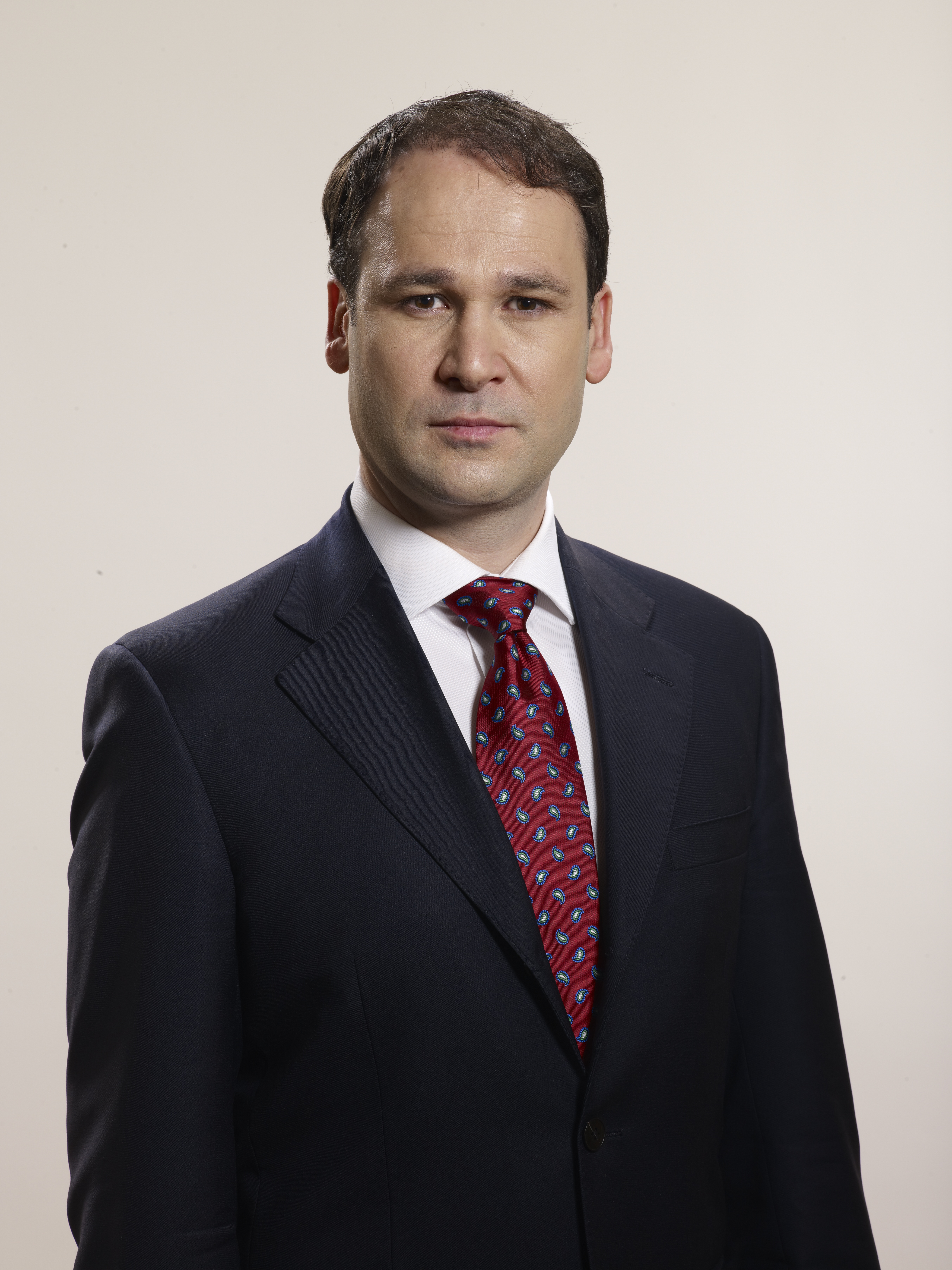 Poza Robert Negoita